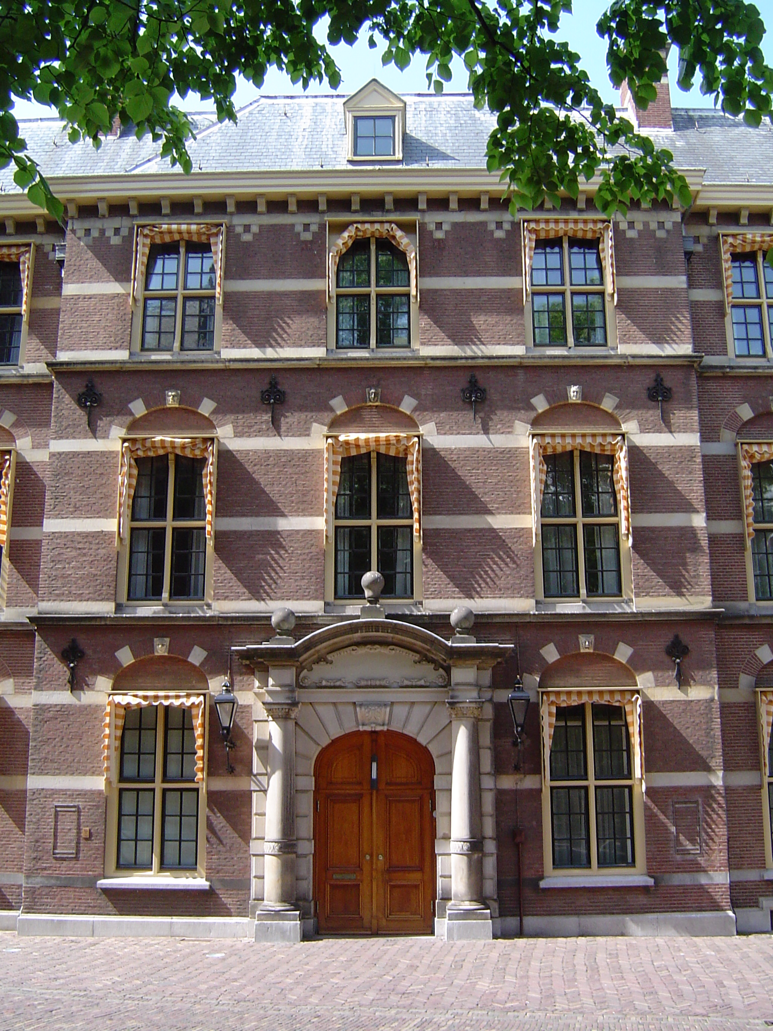 Ministerie Algemene Zaken - Binnenhof, The Hague, Holland